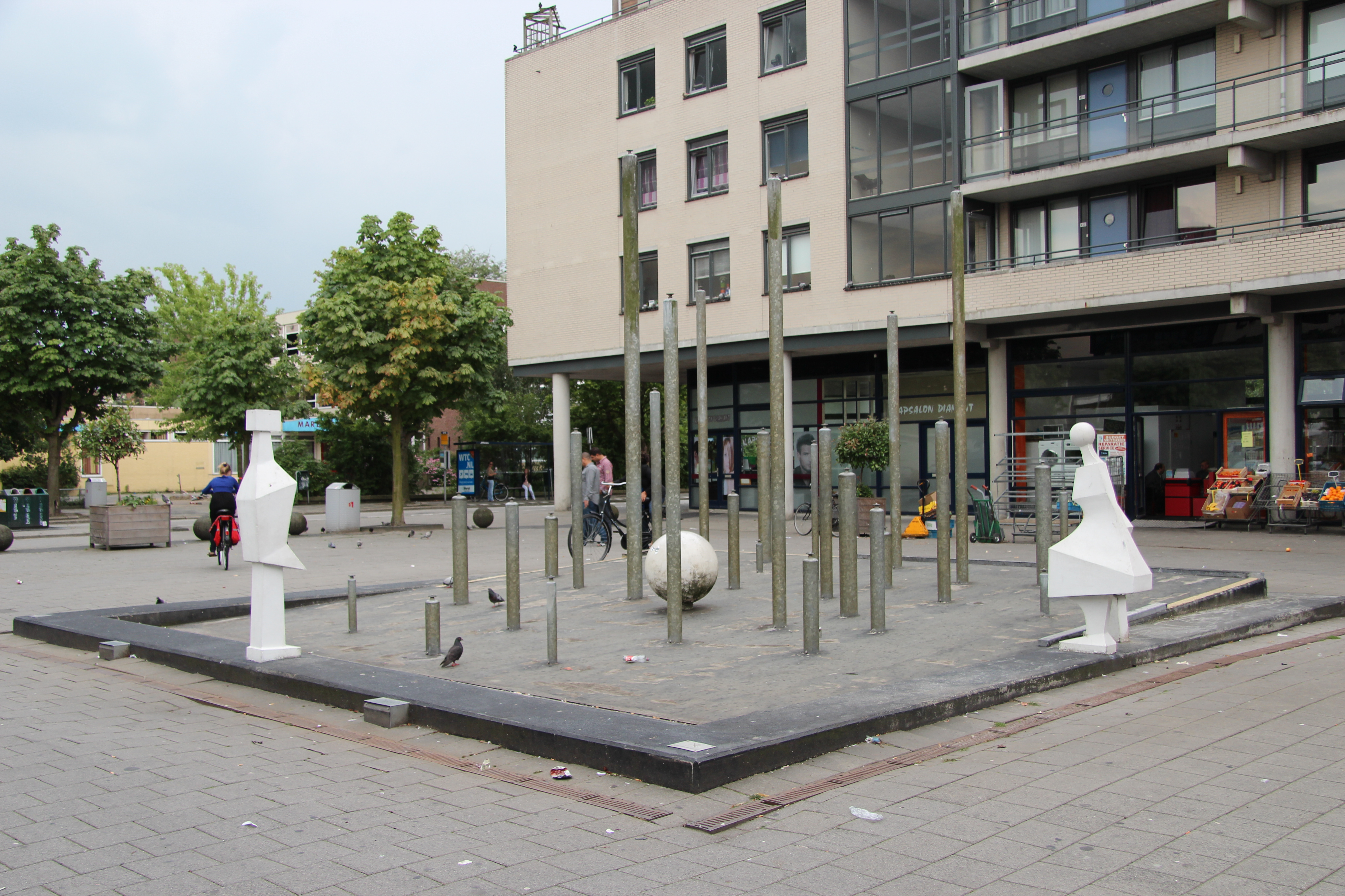 Constant Nieuwenhuis - Fontein - 1970, bij winkelcentrum Kooiplein in Leiden